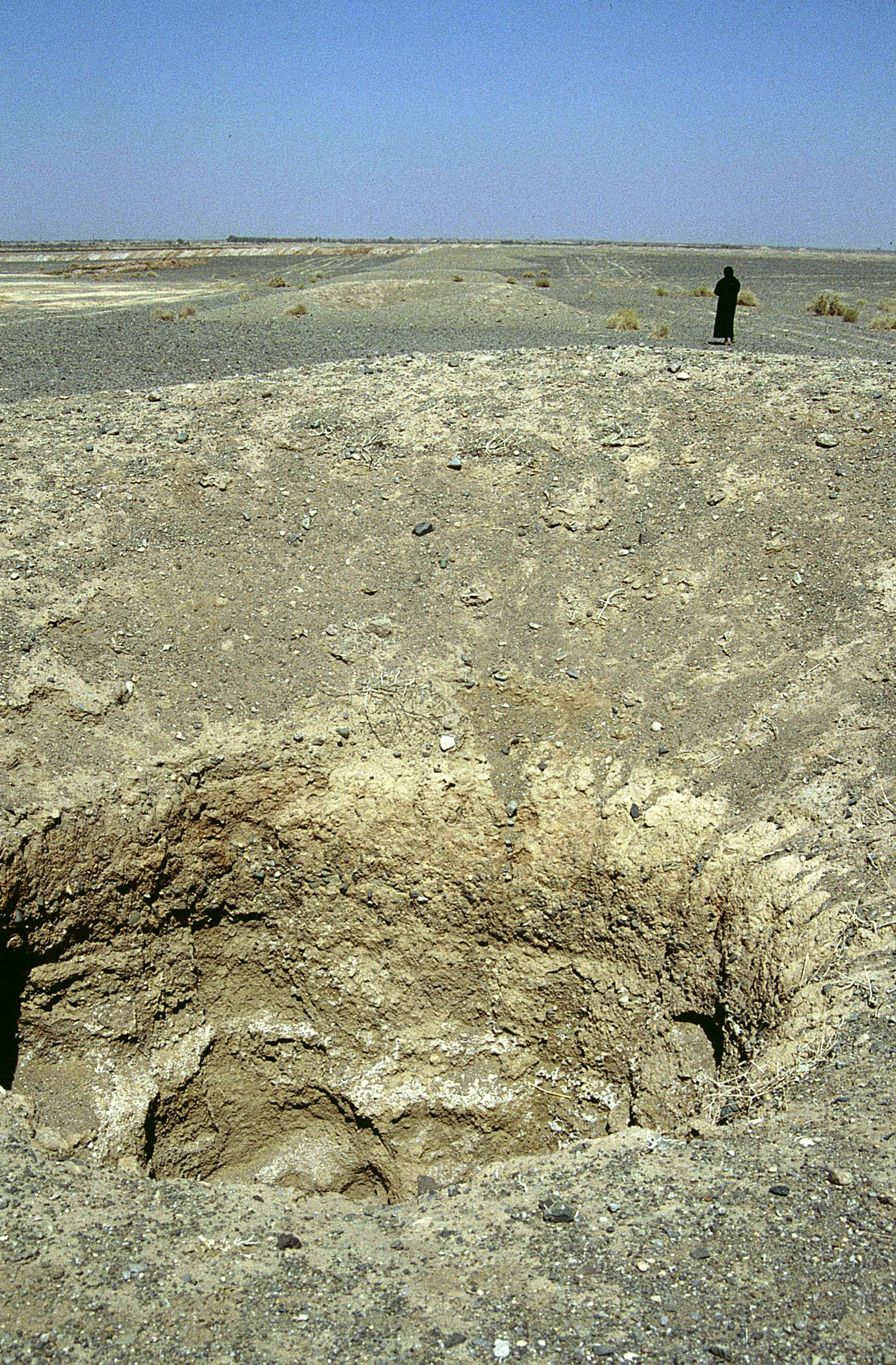 Qanate bei Kerman